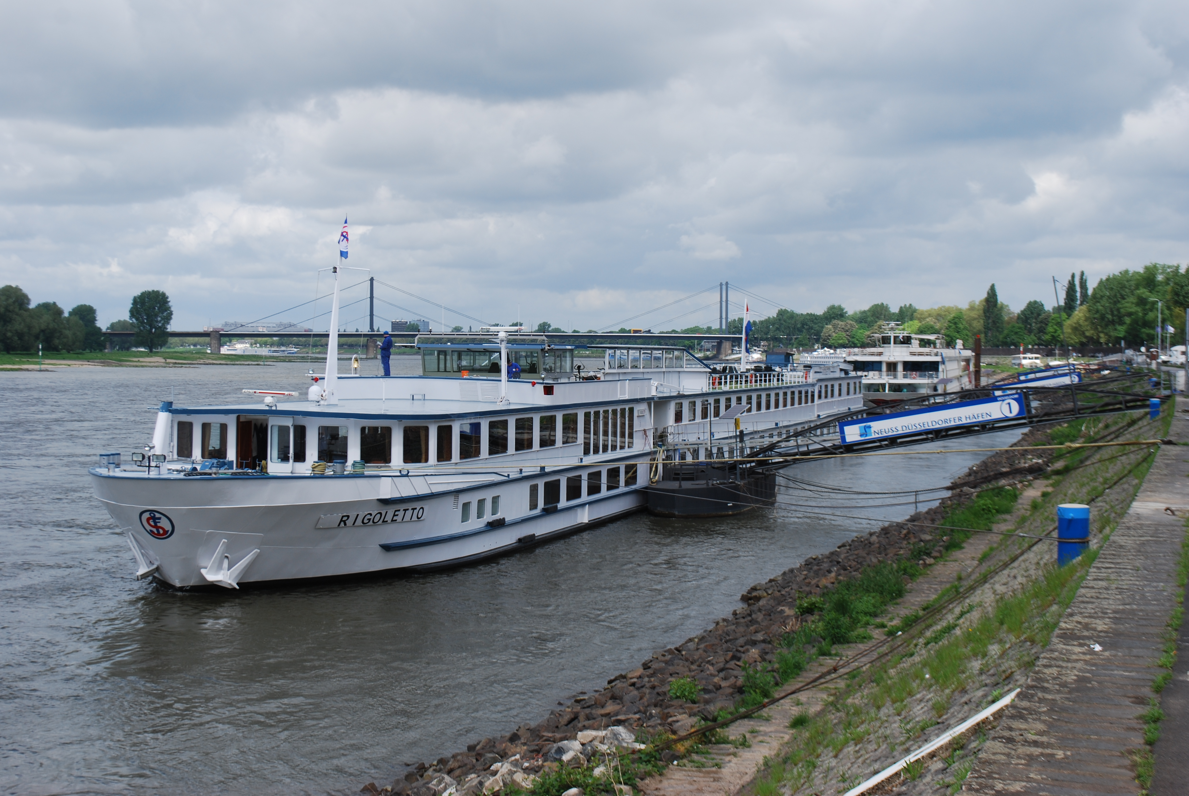 Vue d'un bateau de croisière sur le Rhin, à Düsseldorf.